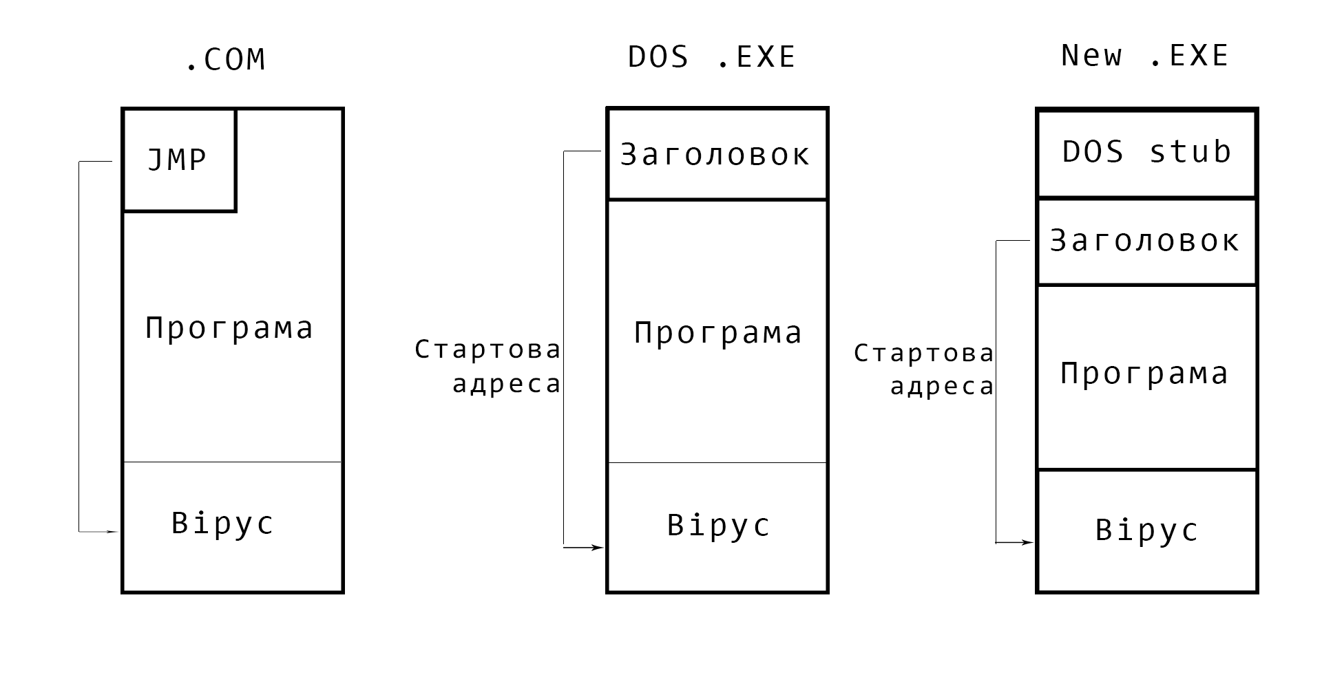 File virus infection mechanism